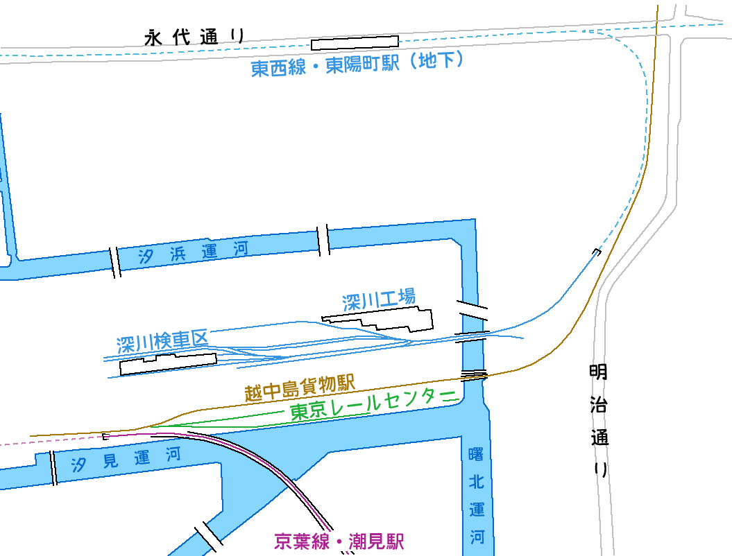 東京メトロ深川車両基地、越中島支線・越中島貨物駅および京葉線・潮見駅などの位置関係を表した図